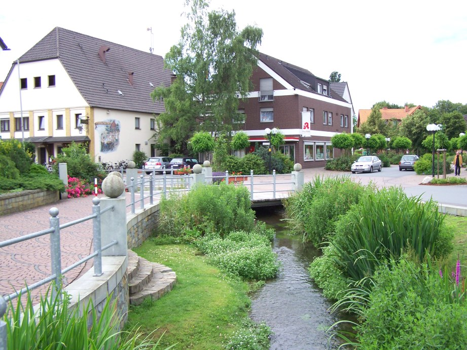 Der vor einigen Jahren umgestaltete Ortskern Bad Westernkottens mit dem wieder offen gelegten Osterbach.